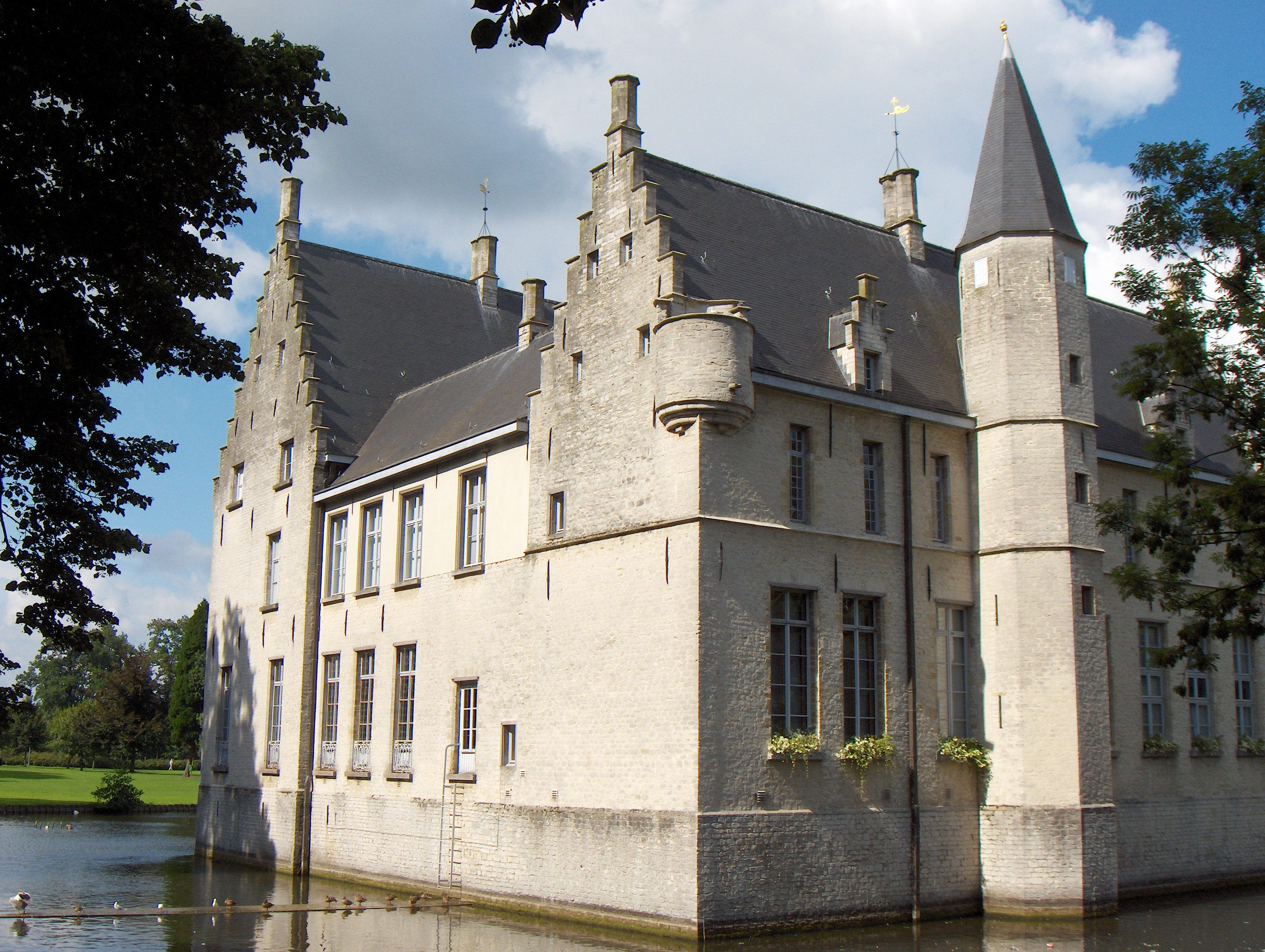 Bild: Beveren (Belgien), Schloss Cortewalle (Kasteel Cortewalle), ältester Teil aus dem 15. Jh., Blick von Süden Fotograf: Friedrich Tellberg Datum: 14. August 2005